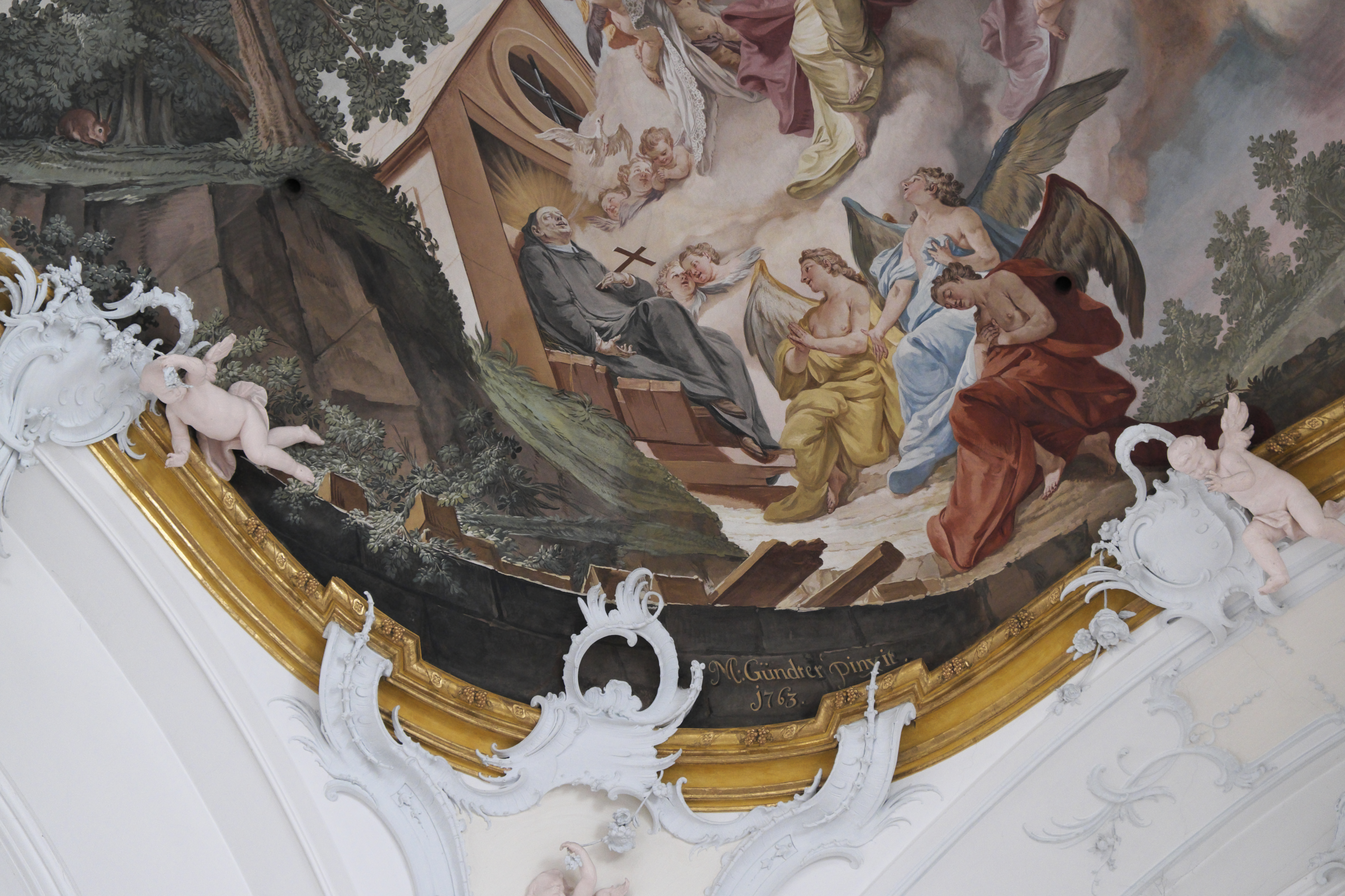 Katholische Pfarrkirche St. Marinus und Anianus, ehemalige Abteikirche des Benediktinerklosters Rott in Rott am Inn im Landkreis Rosenheim (Bayern/Deutschland), Deckenfresken von Matthäus Günther, von 1763; mit der Signatur: M. Gündter pinxit 1763; Darstellung: Tod des heiligen Anianus (Ausschnitt)